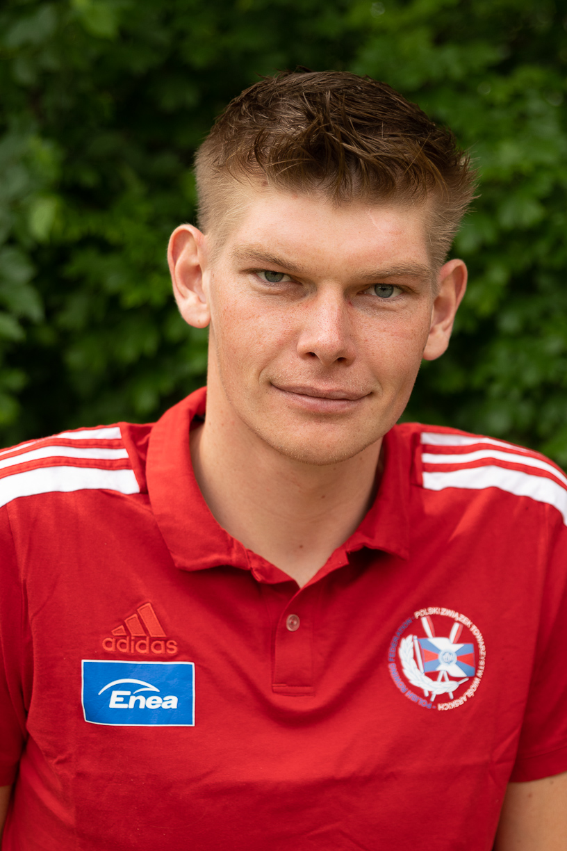 Polski wioślarz Robert Fuchs